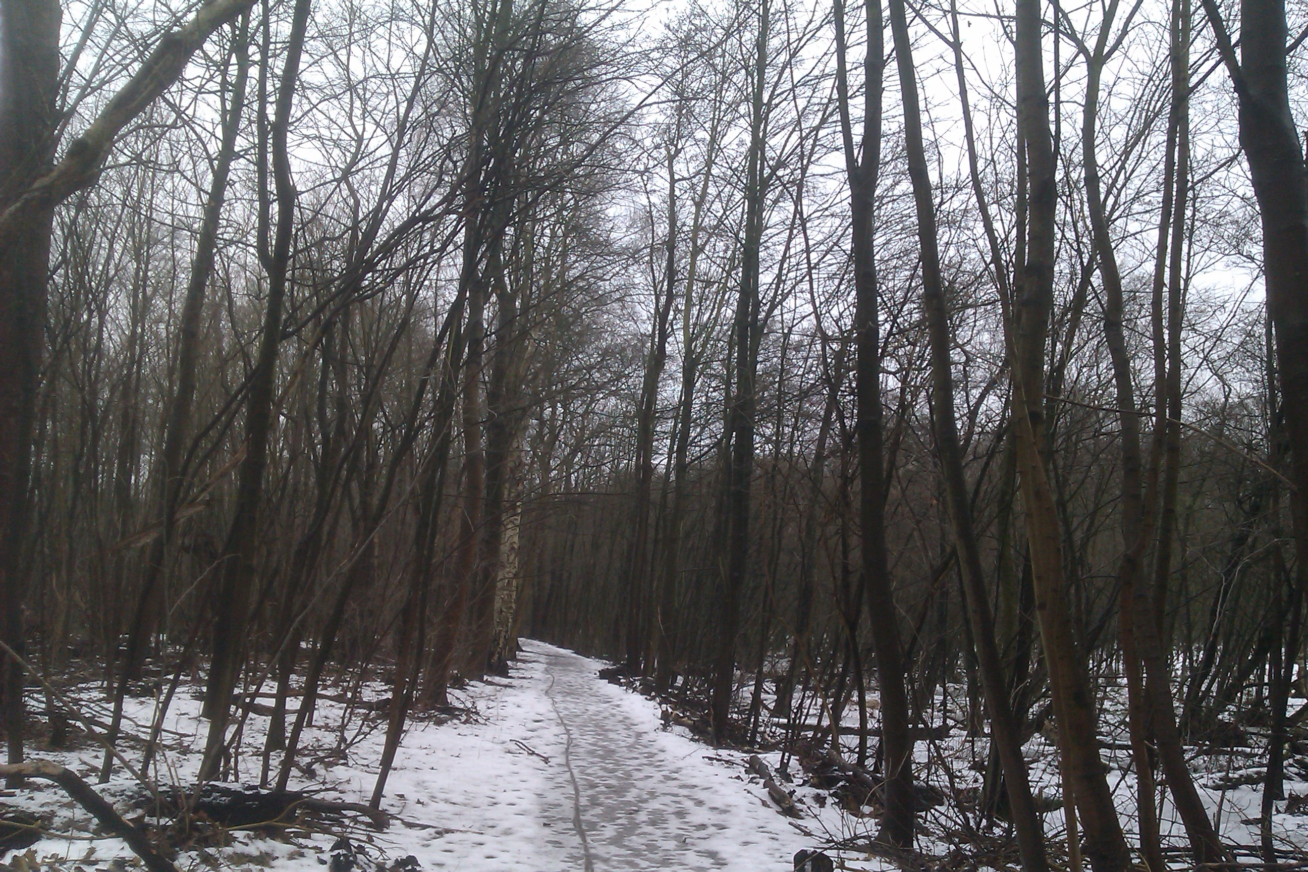 Gammelmose, januar 2013